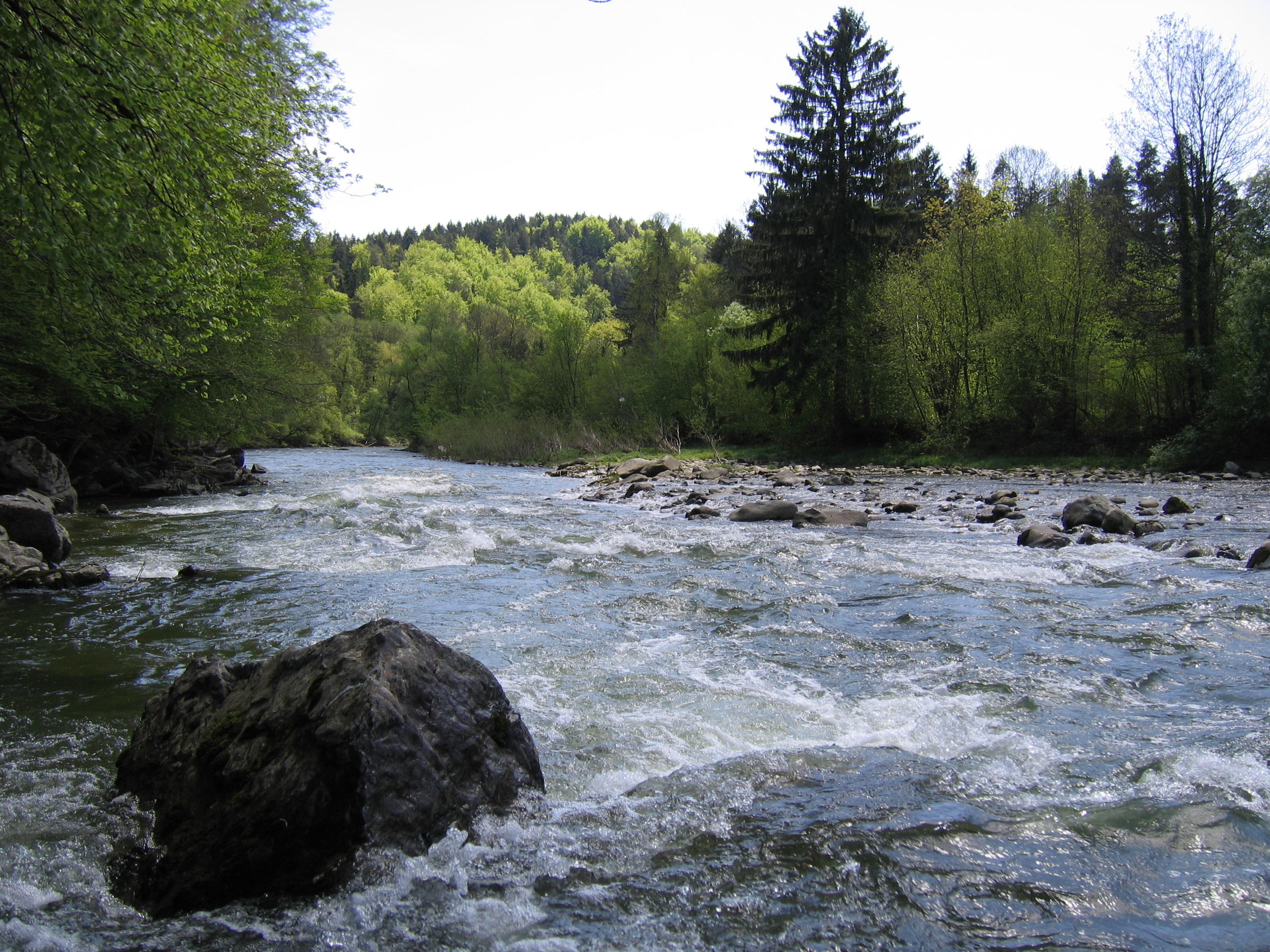 Deutschland - Baden-Württemberg - Bodenseekreis - Tettnang: Im NSG „Argen“, Argental beim Ortsteil Heggelbach